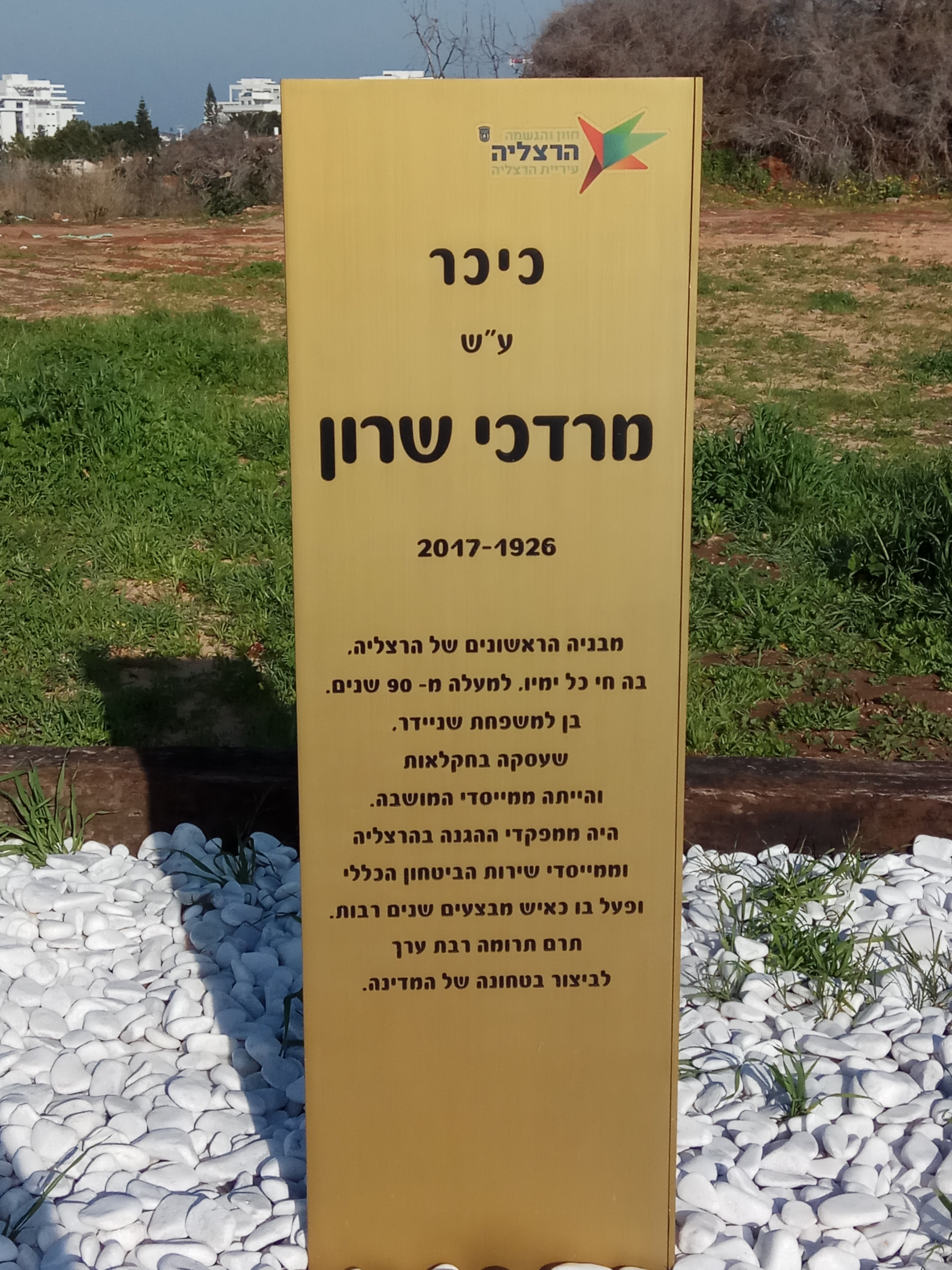 שלט הנצחה למרדכי שרון בהרצליה, בכניסה לקיבוץ גליל ים